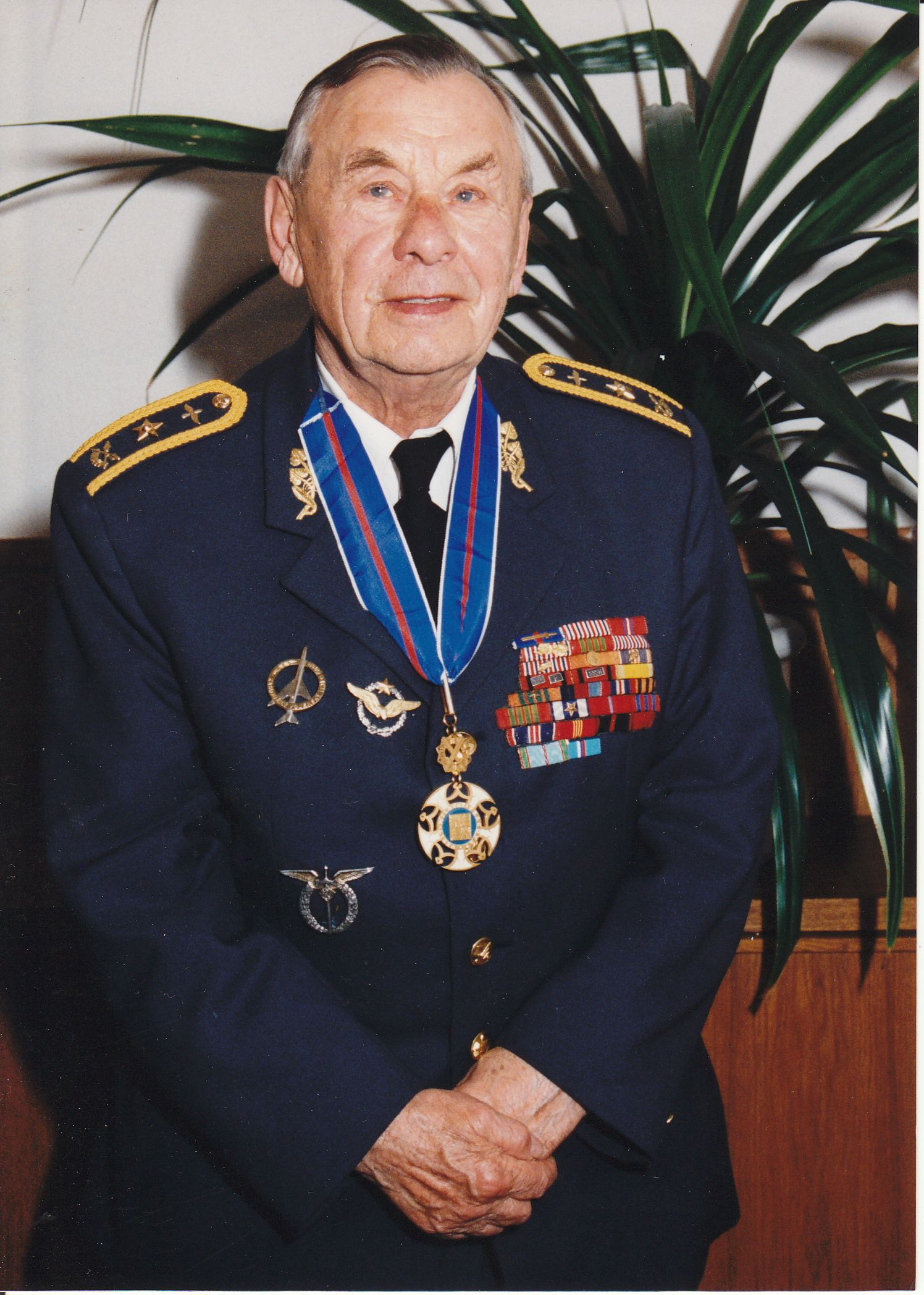 generálmajor v.v. F.Chábera